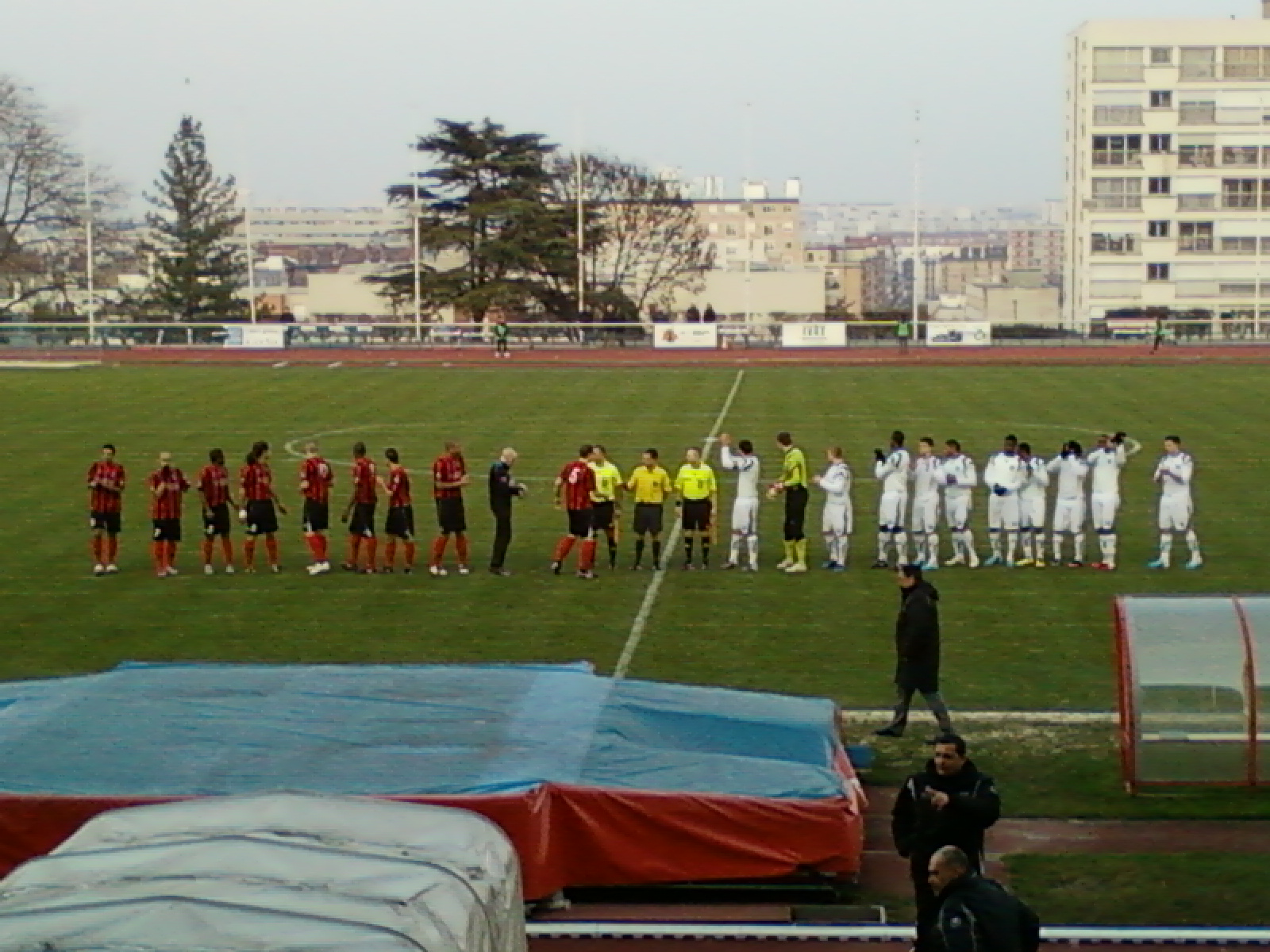 Présentation des équipes lors du match Ivry - Auxerre B du 5 mars 2011